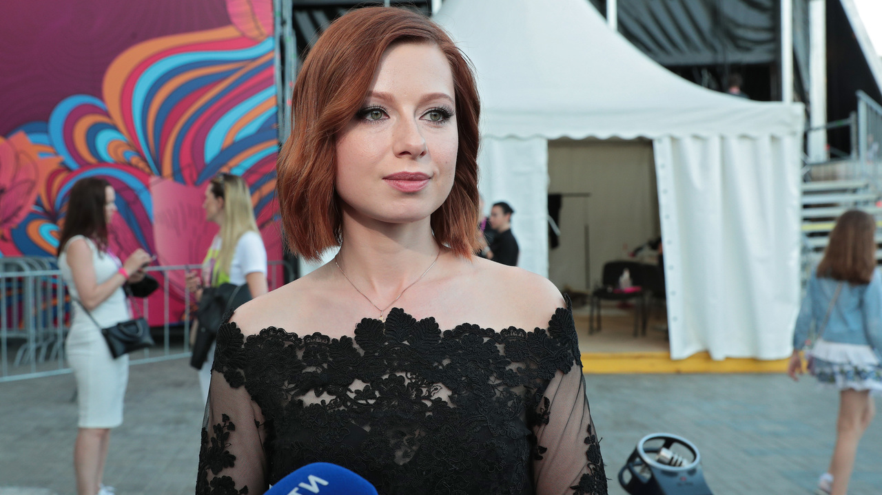 Глава Республики Крым Сергей Аксёнов принял участие в церемонии открытия финала 12-го Международного конкурса молодых исполнителей популярной музыки «Детская новая волна - 2019», который проходит в МДЦ «Артек».